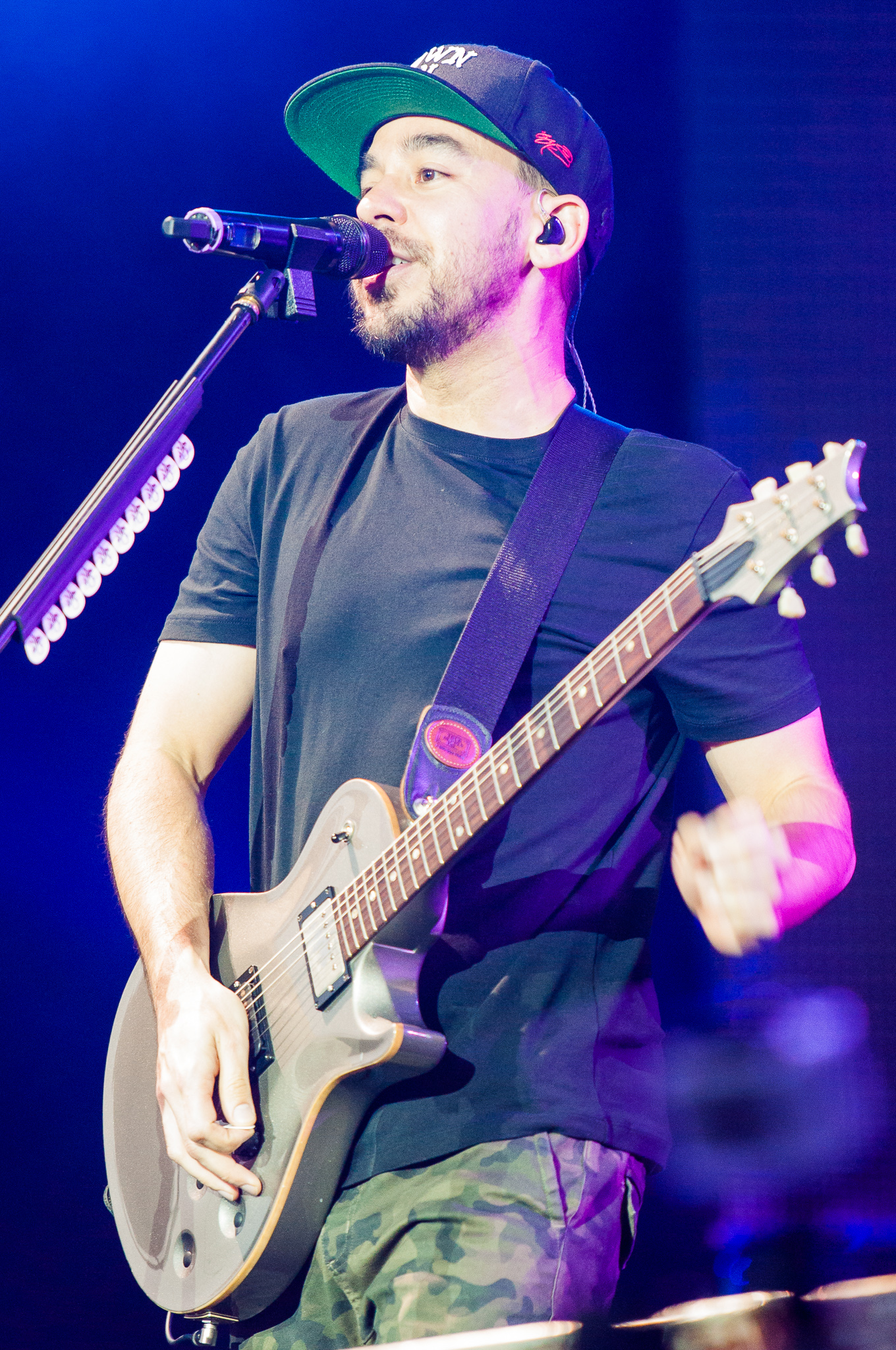 ARGO-Konzerte,Centerstage,Konzert,Linkin Park,Livekonzert,Livemusik,Mike Shinoda,Musik,RiP,Rock im Park 2014